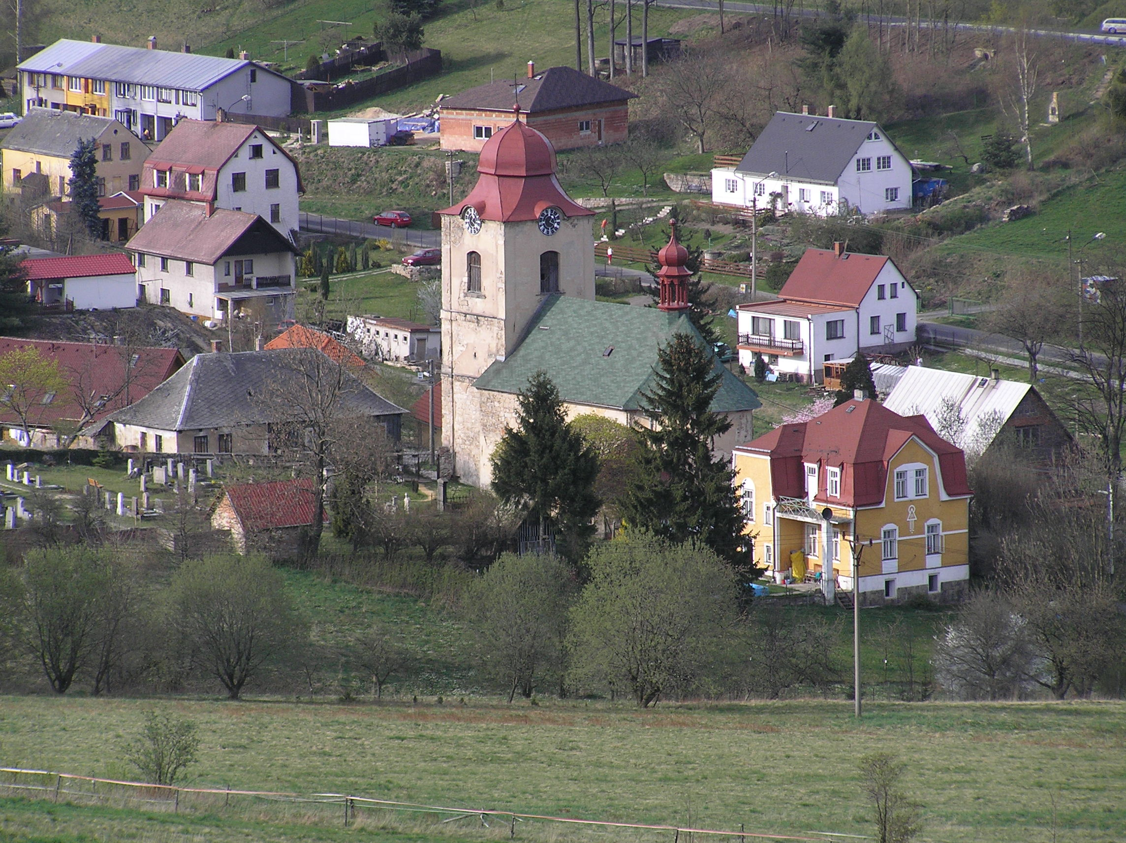 Kostel svaté Anny, Jeřmanice.